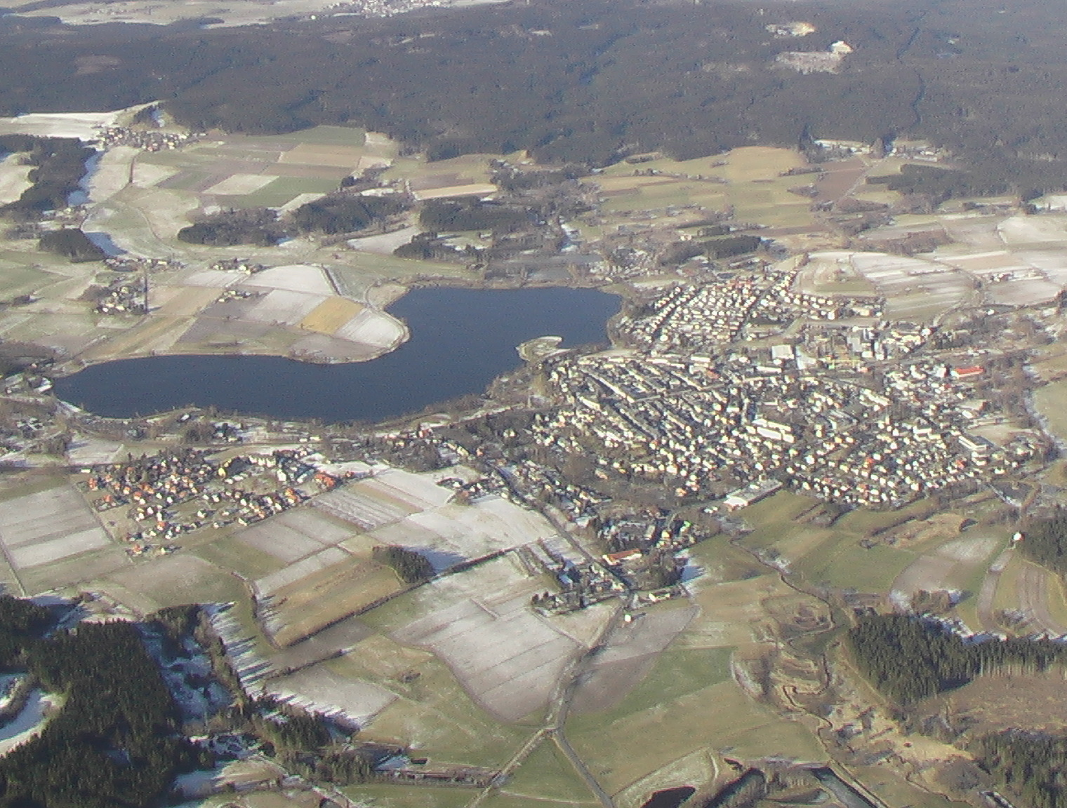 Weißenstadt im Januar 2005 (Original text: Weißenstadt) Fotograf / Zeichner: Pegasus2